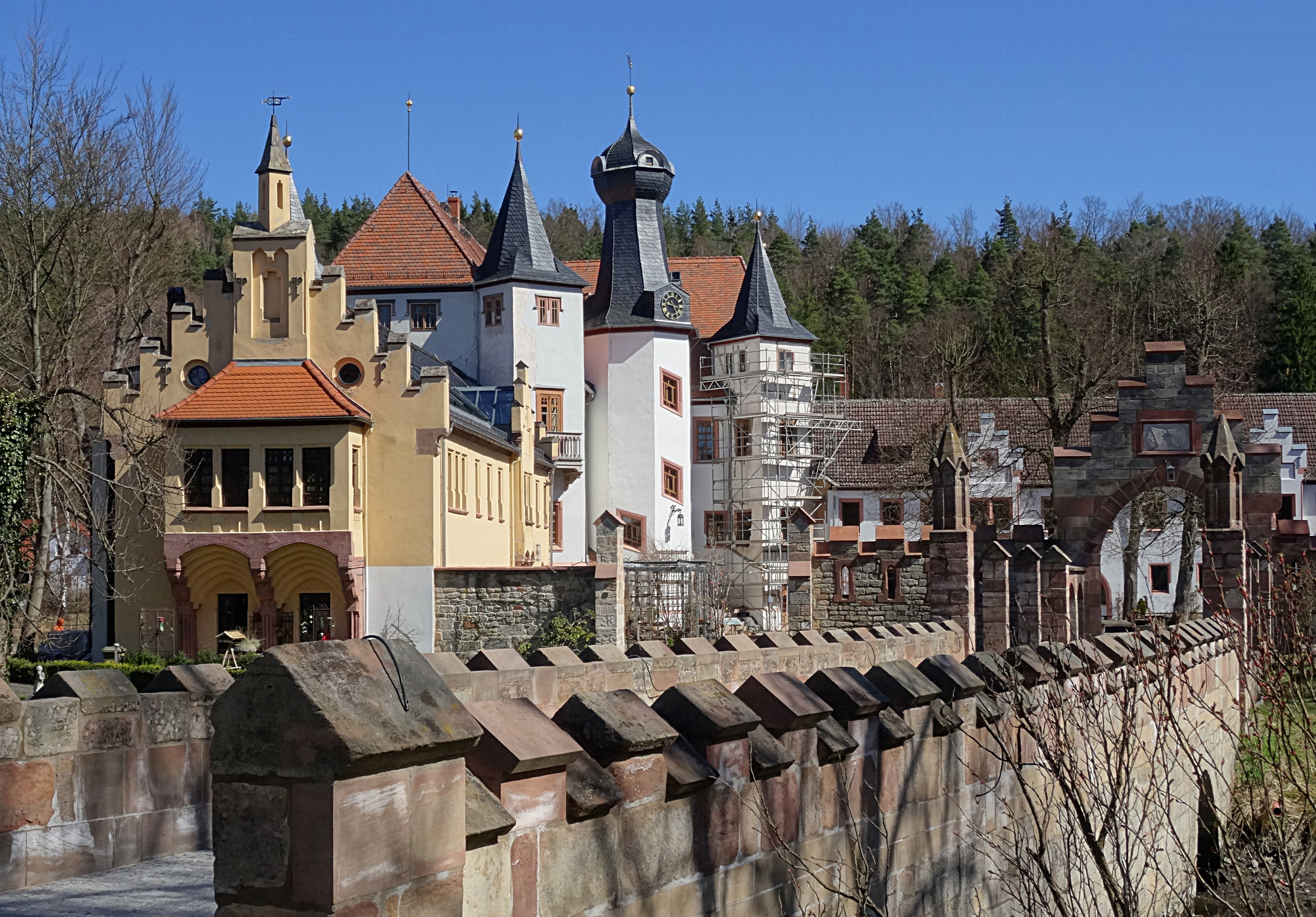 Jagdschloss Fröhliche Wiederkunft in Wolfersdorf 2018